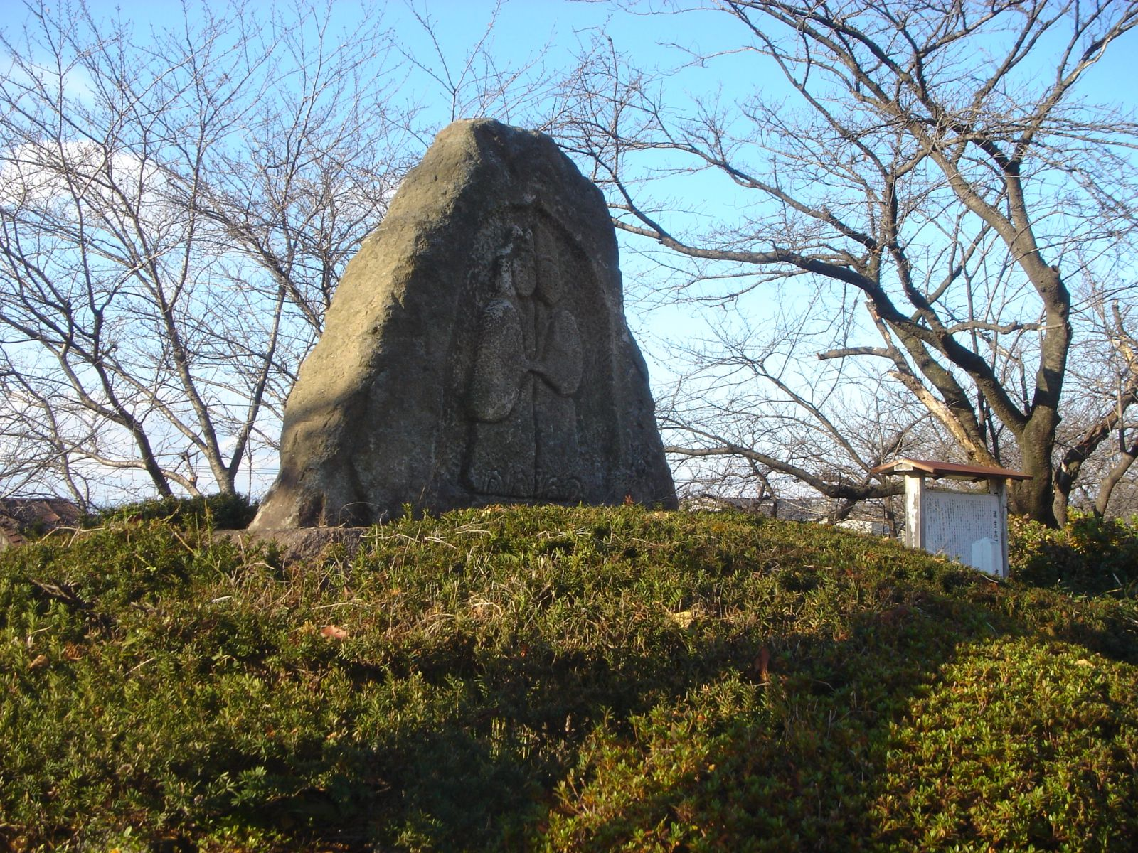 Hesoduka(魂生大明神の境内にあるへそ塚),Kasamatsu,Gifu,Japan(岐阜県笠松町)で撮影。